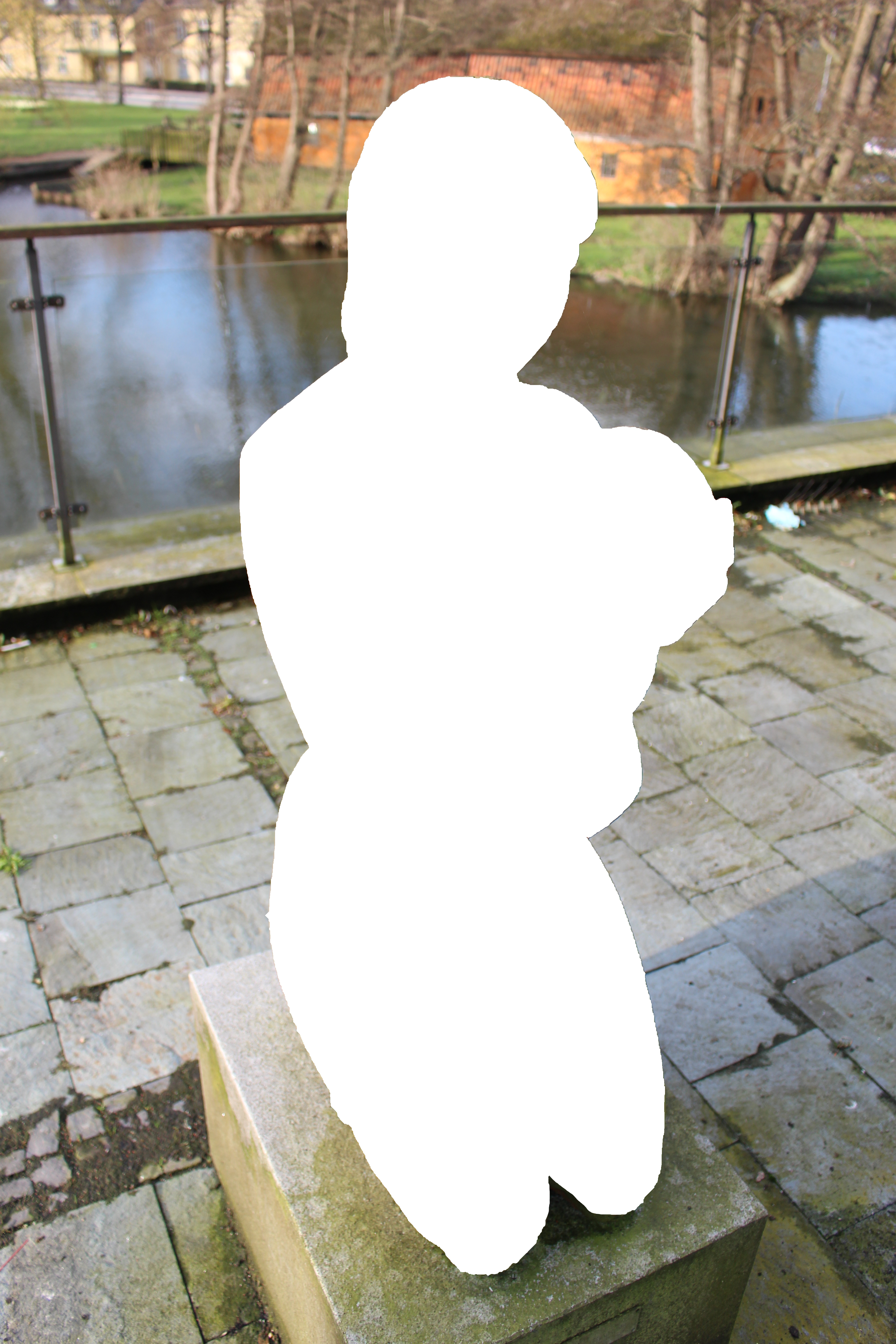 Foto af placeringen af Johannes Hansens skulptur "Mor og barn". Skulpturen censoreret pga. ophavsret.